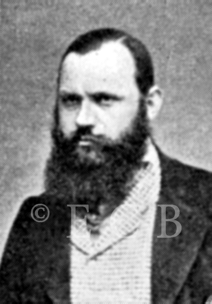 Wenzel Rosenauer (1824 - 1874), Rakouský a český podnikatel a politik.